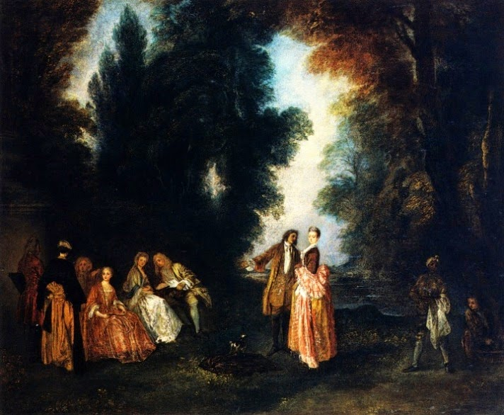 Reproduction du tableau d'Antoine Watteau